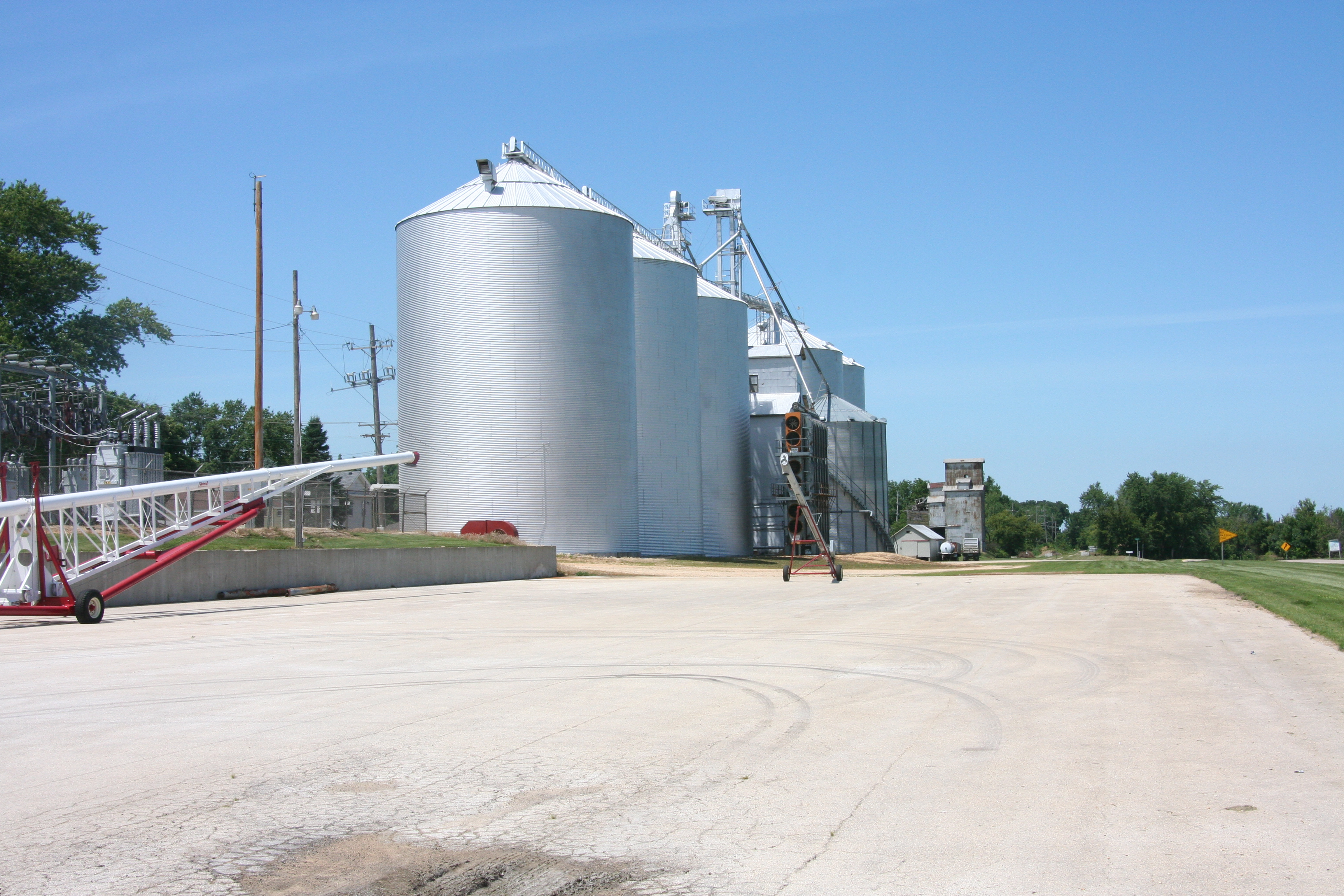 Large grain elevator in Baileyville, Illinois, USA.